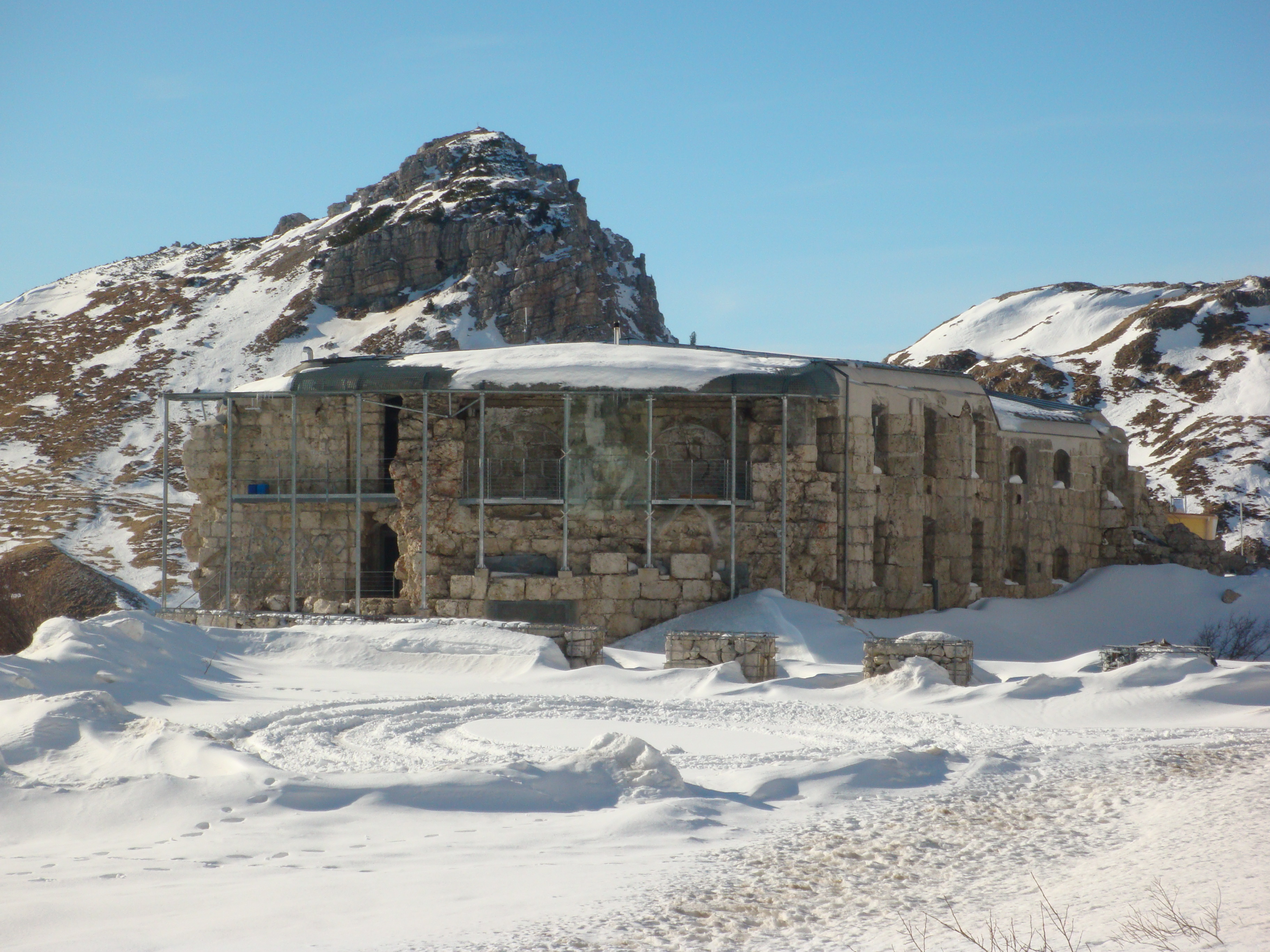 Werk Tre Sassi am Valparolapass